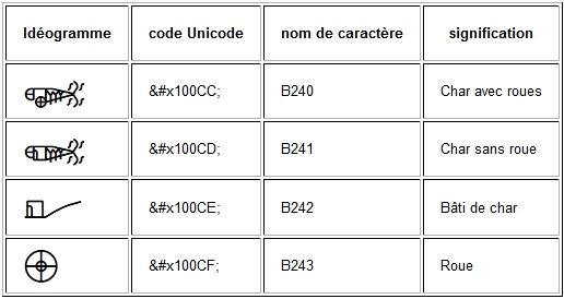 caractères B240 à B243 du linéaire b représentant un char, un char sans roue, un bâti de char et une roue (d'après unicode v5)